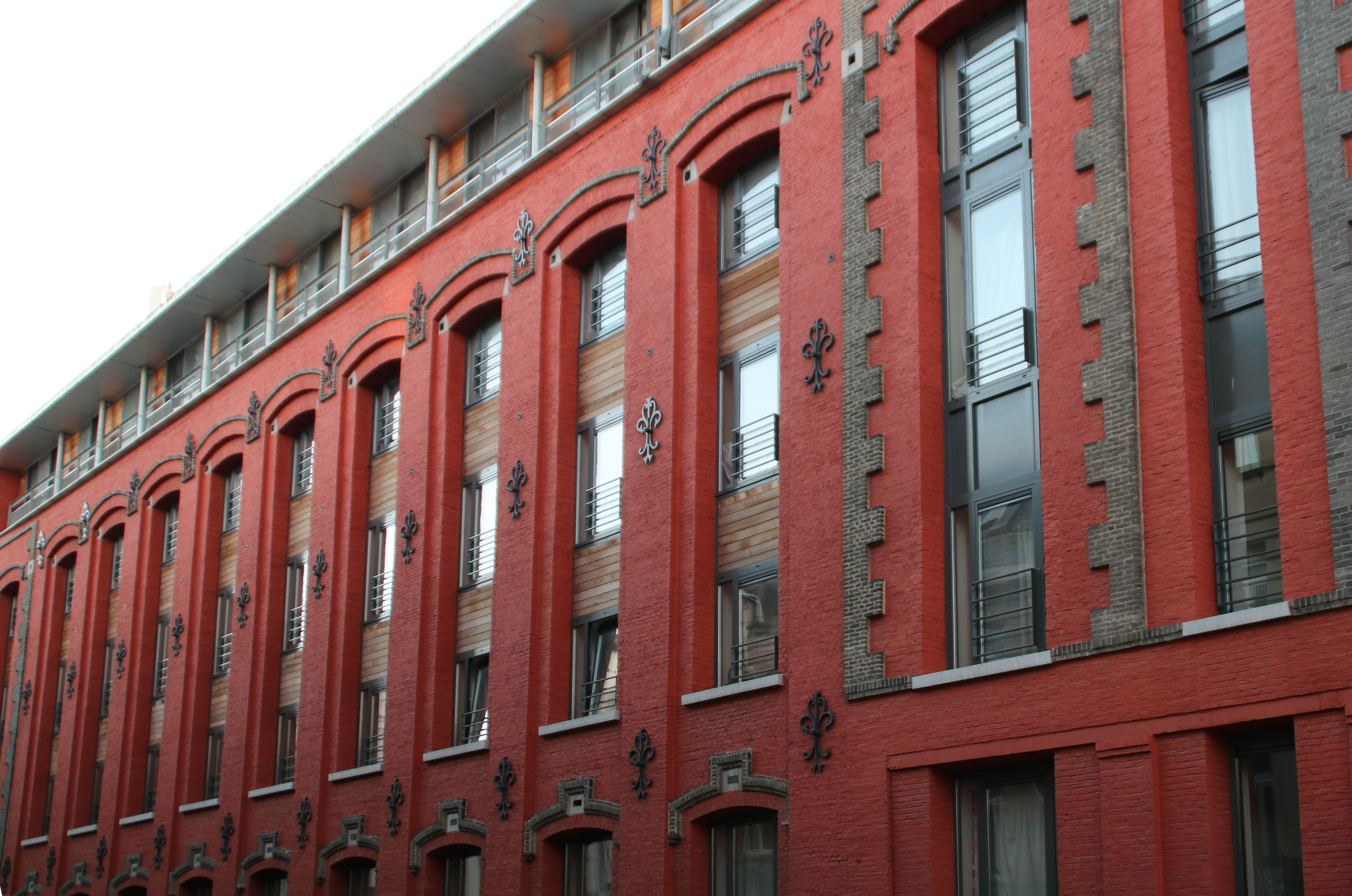 Usine